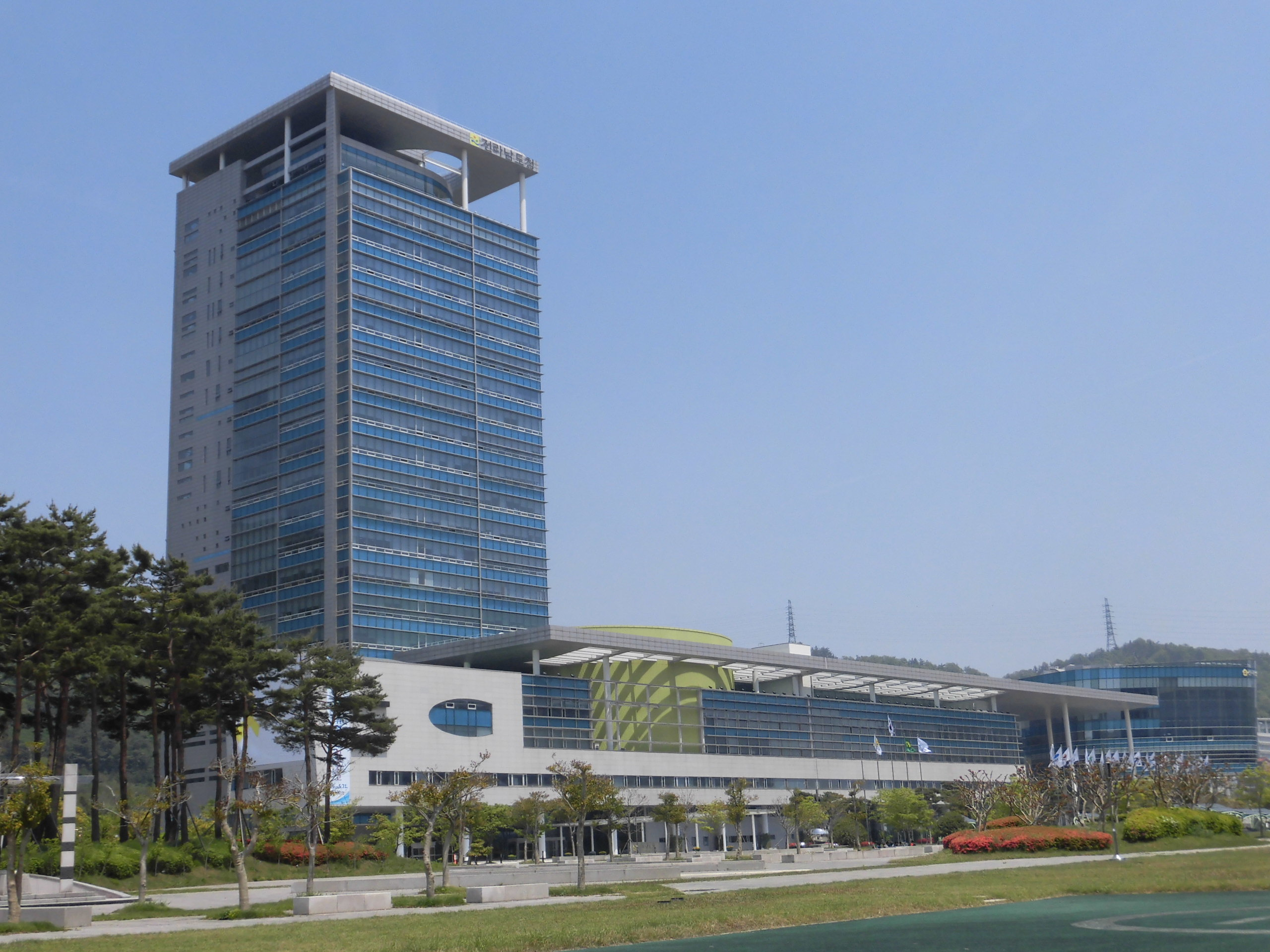 전라남도 무안군에 있는 전라남도청